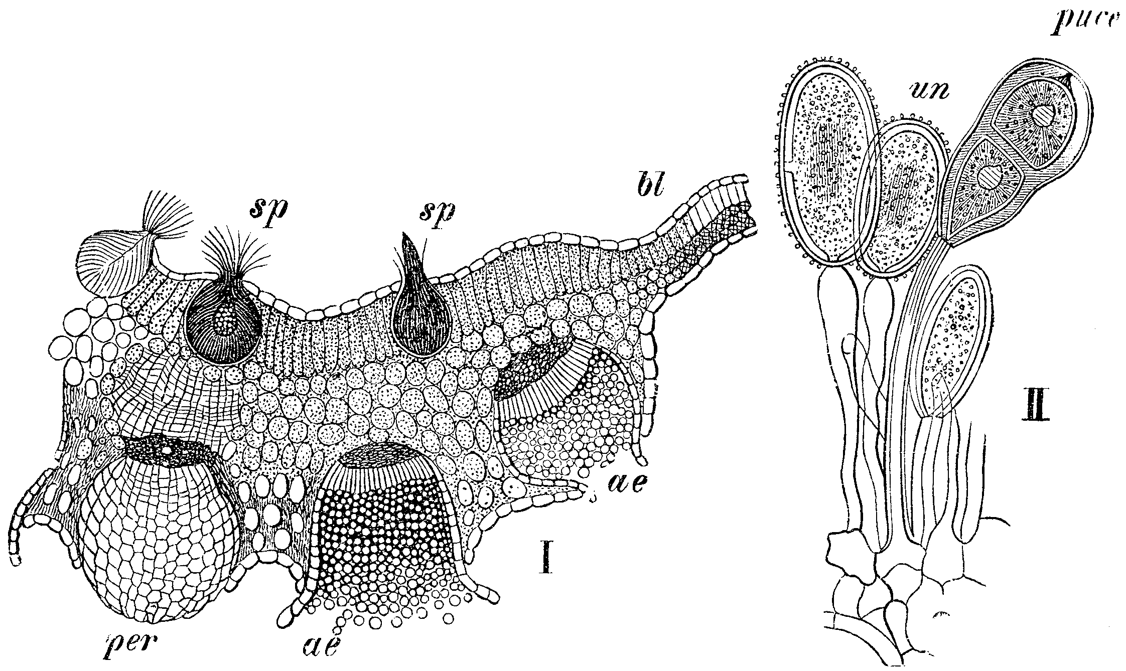 Slika 331. Progasta rja. (Puccínia gráminis.)